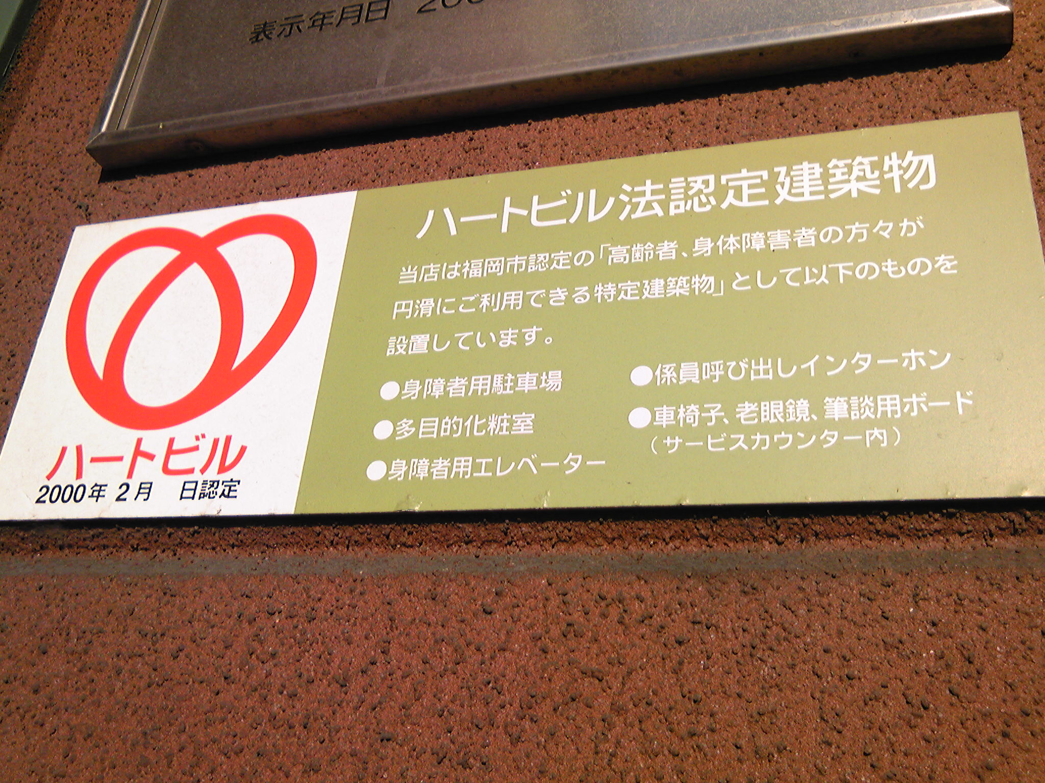 ダイエーマリナタウン店（福岡市西区）のハートビル表示